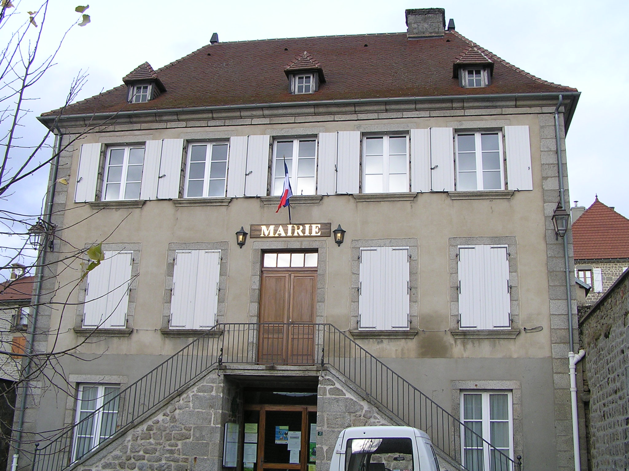 mairie de Crocq